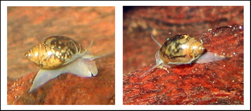 Photographie de Physe (Physa marmorata), escargot fréquemment présent dans les aquariums.